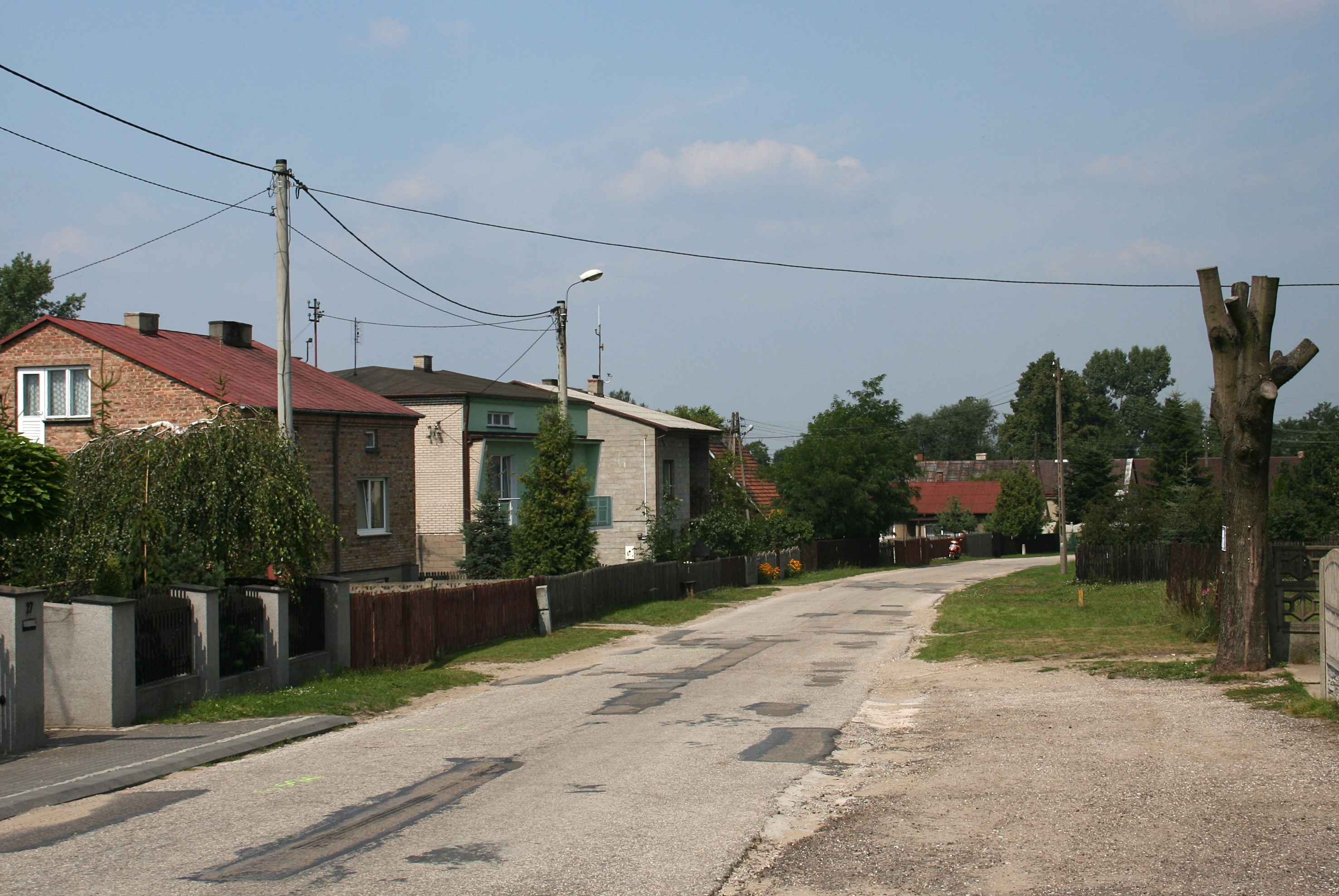 Fragment miejscowości Biała Górna, gmina Kłobuck, woj. śląskie